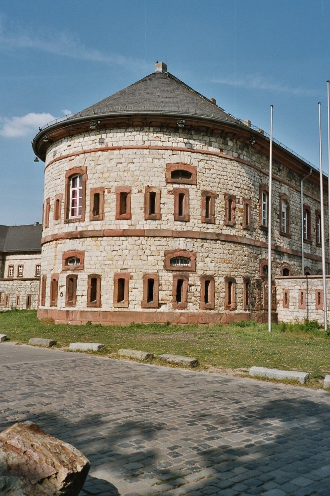 The Reduit of the Bundesfestung (Fortress) of Mainz in Germany